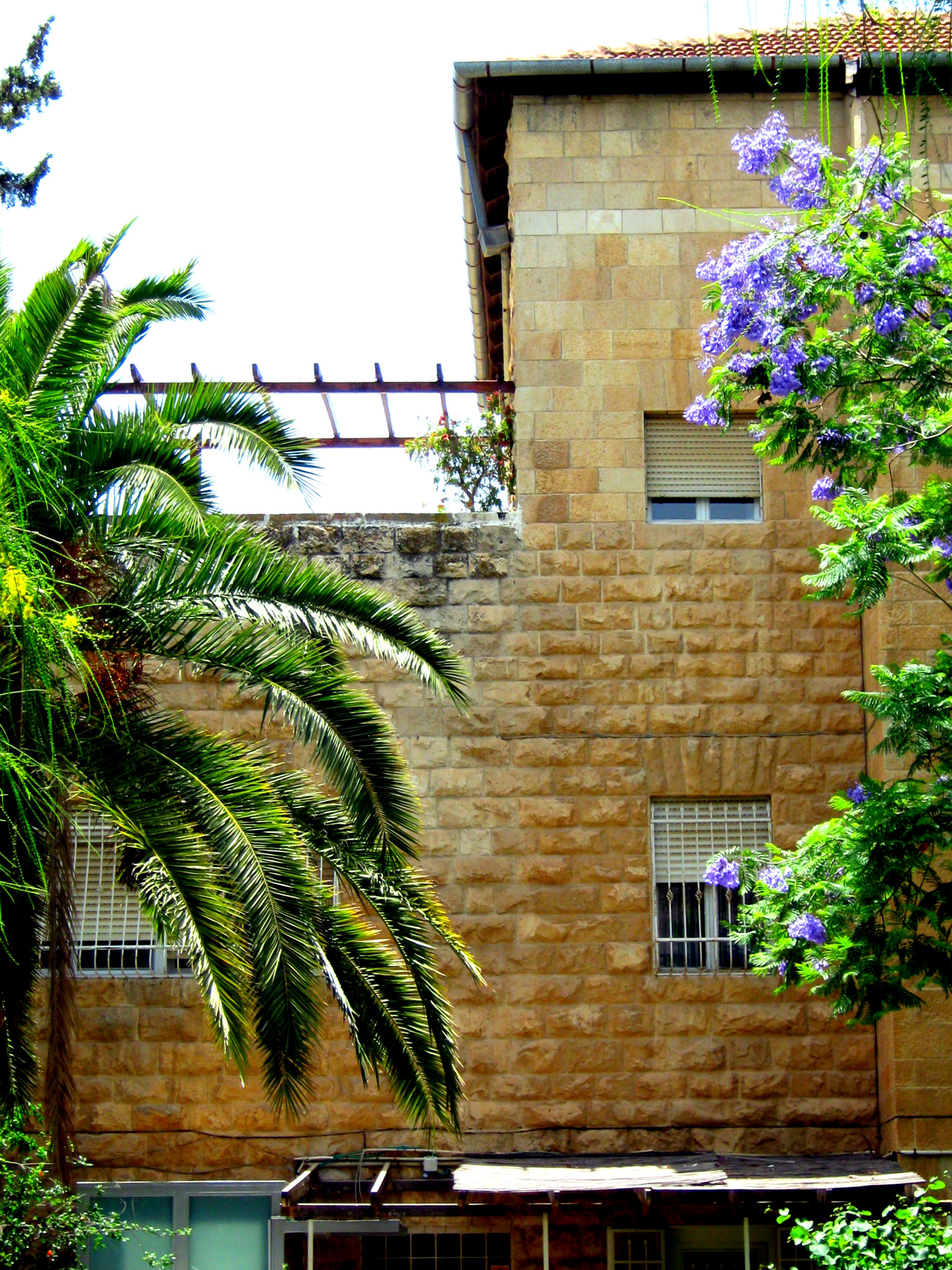 בית ד"ר מרדכי בוקסבוים בגבול שכונת רחביה-שערי חסד בירושלים (בית השופט מנחם אלון) אדריכל ליאופולד קרקאור